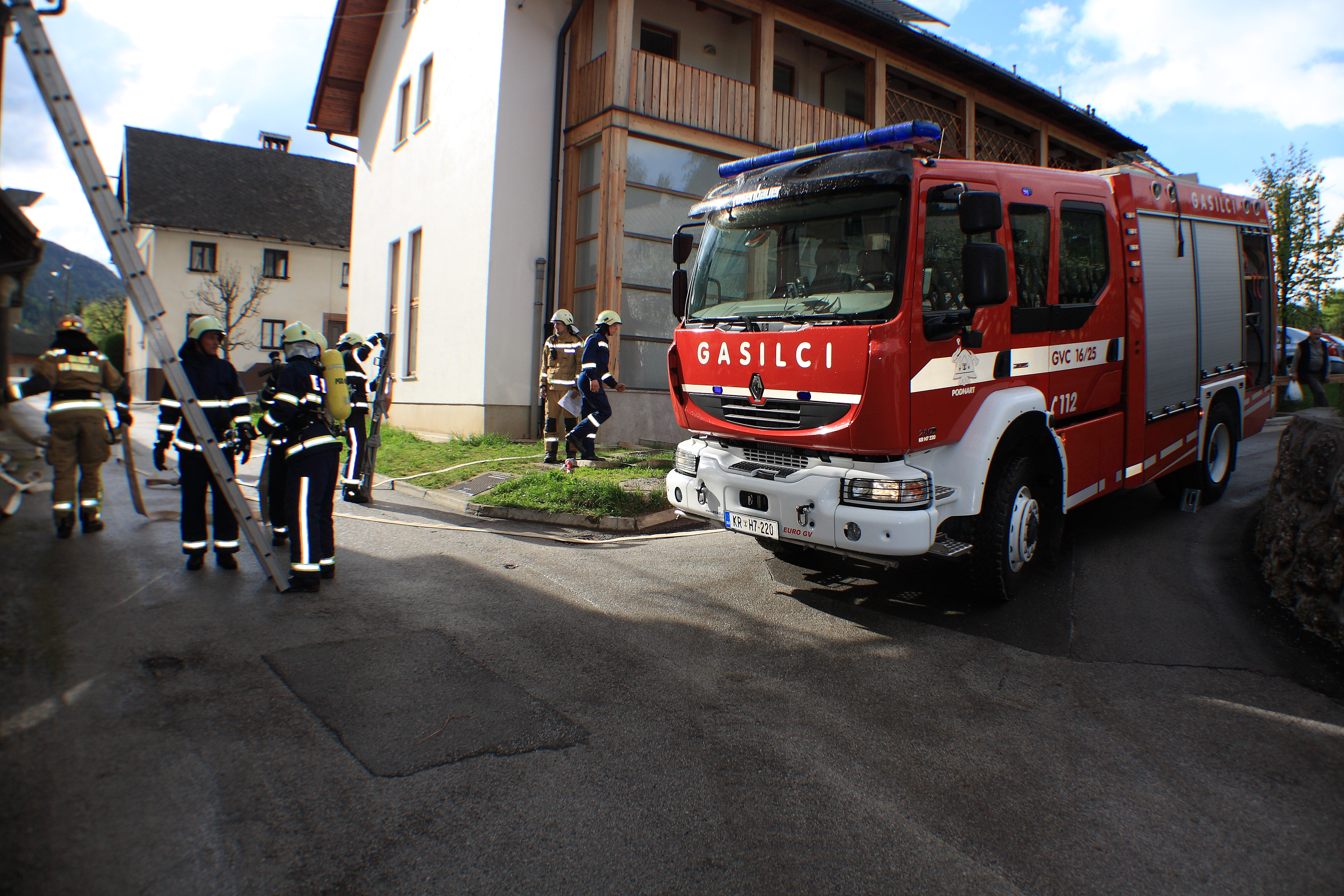 Vaja ob zaključku nadaljevalnega tečaja za gasilca v GZ občine Radovljica. Fire drill for new firefighters.